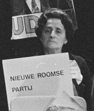 Collectie / Archief : Fotocollectie Anefo Reportage / Serie : Televisie-uitzending van de AVRO met 27 lijsttrekkers in Bellevue te Amsterdam Beschrijving : Presentator Wibo van de Linde (l) met "kleine" lijsttrekkers op de stoelen Datum : 27 april 1971 Locatie : Amsterdam, Noord-Holland Trefwoorden : lijsttrekkers, politieke partijen, televisieprogramma's, verkiezingen Persoonsnaam : Linde, Wibo van de Instellingsnaam : Bellevue Fotograaf : Fotograaf Onbekend / Anefo Auteursrechthebbende : Nationaal Archief Materiaalsoort : Negatief (zwart/wit) Nummer archiefinventaris : bekijk toegang 2.24.01.05 Bestanddeelnummer : 924-4954